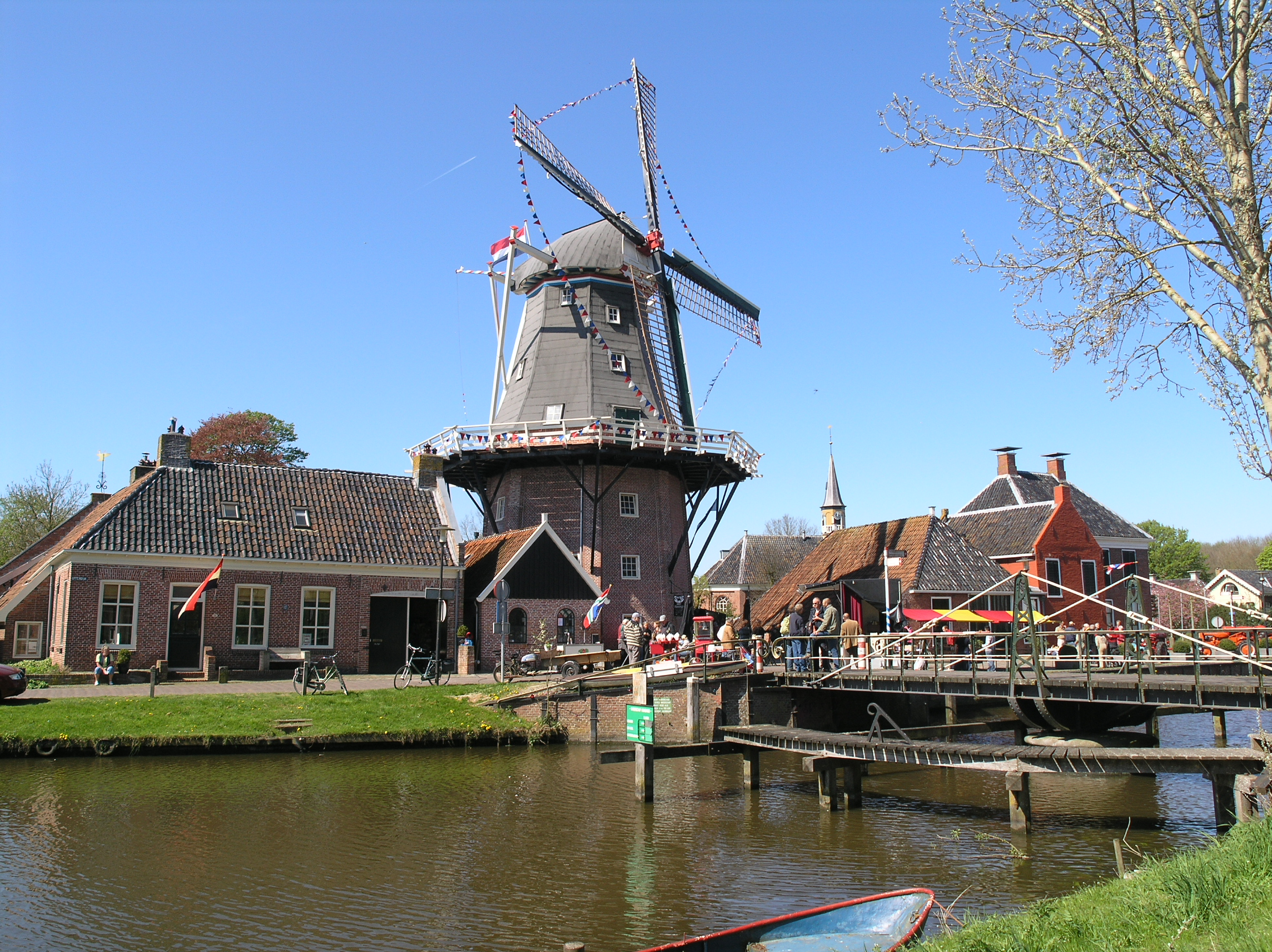 Onderdendam stellingmolen Hunsingo